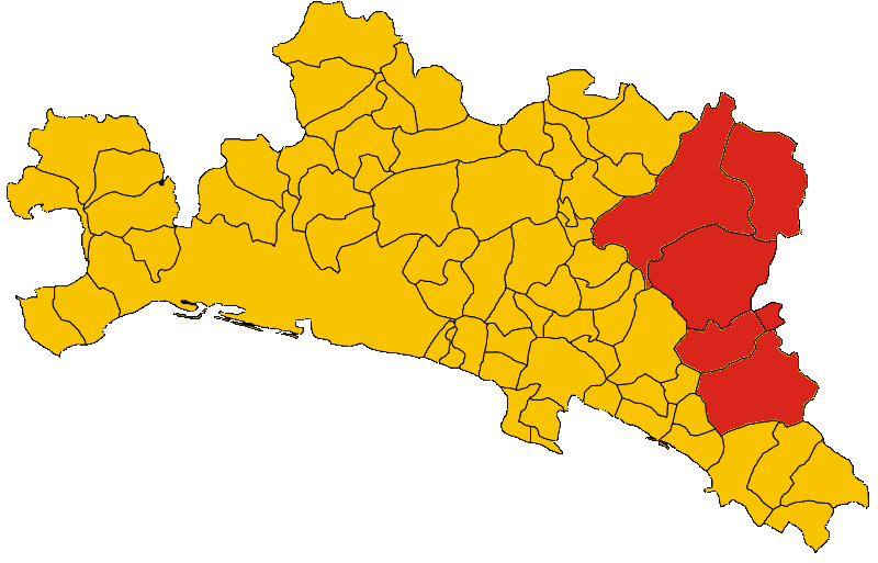 Mappa del Parco naturale regionale dell'Aveto (Provincia di Genova, Liguria, Italia) con i comuni del parco